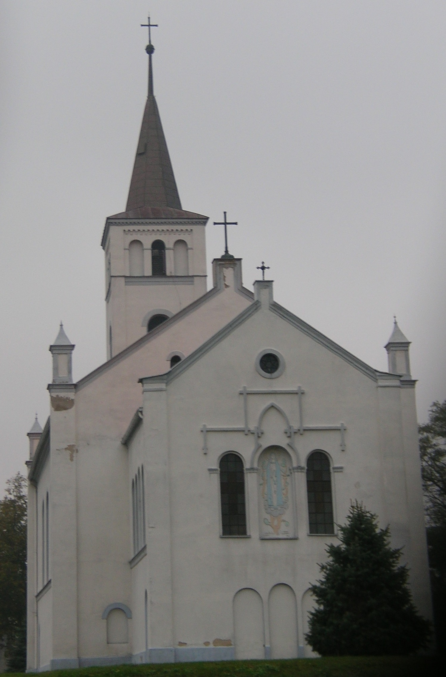 kościół w Roszkowicach, church in Roszkowice